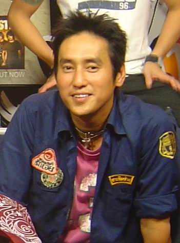 Suksit TaengThong at MTV Just Talk